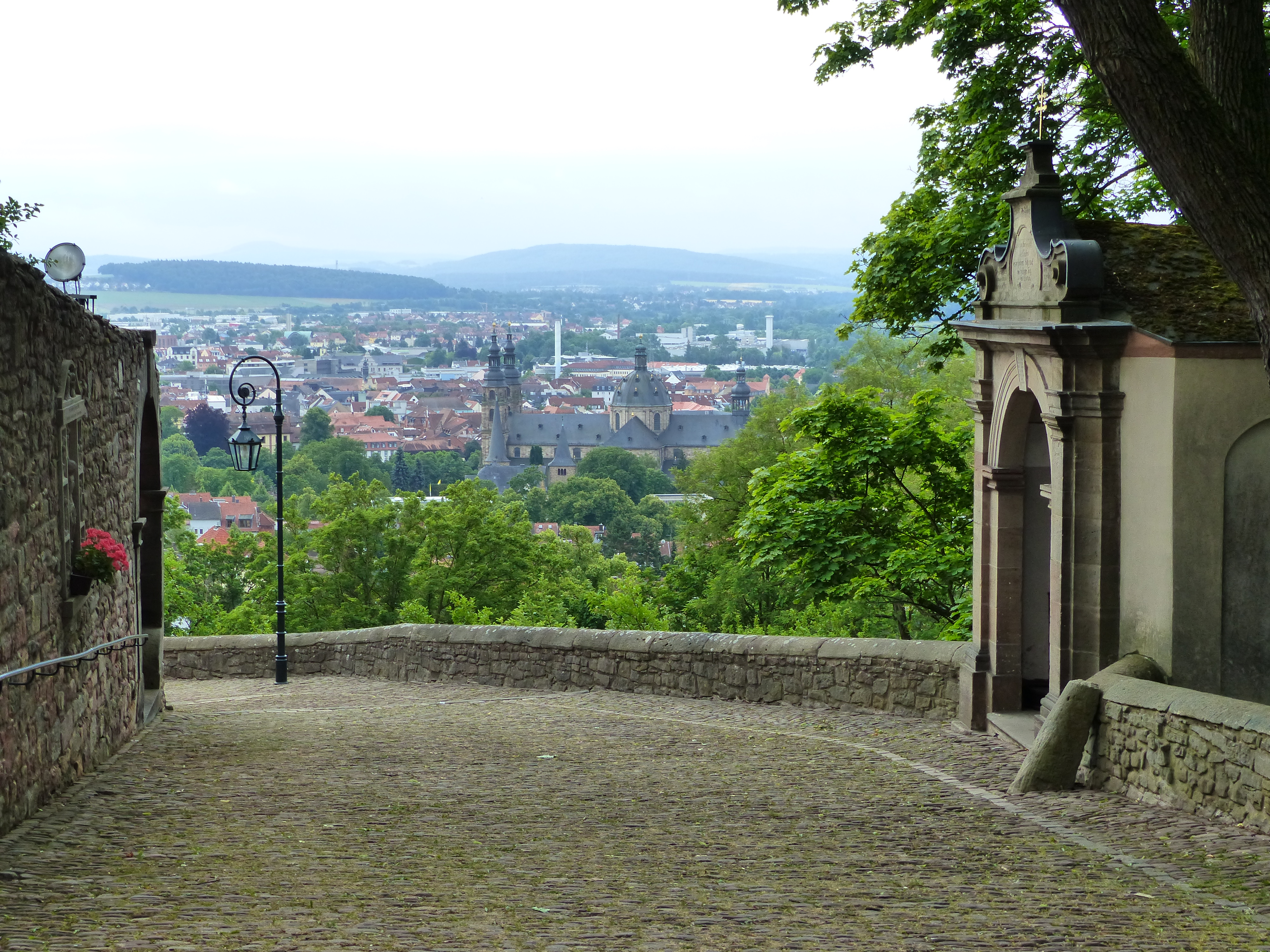 Franziskanerkloster Frauenberg, Fulda